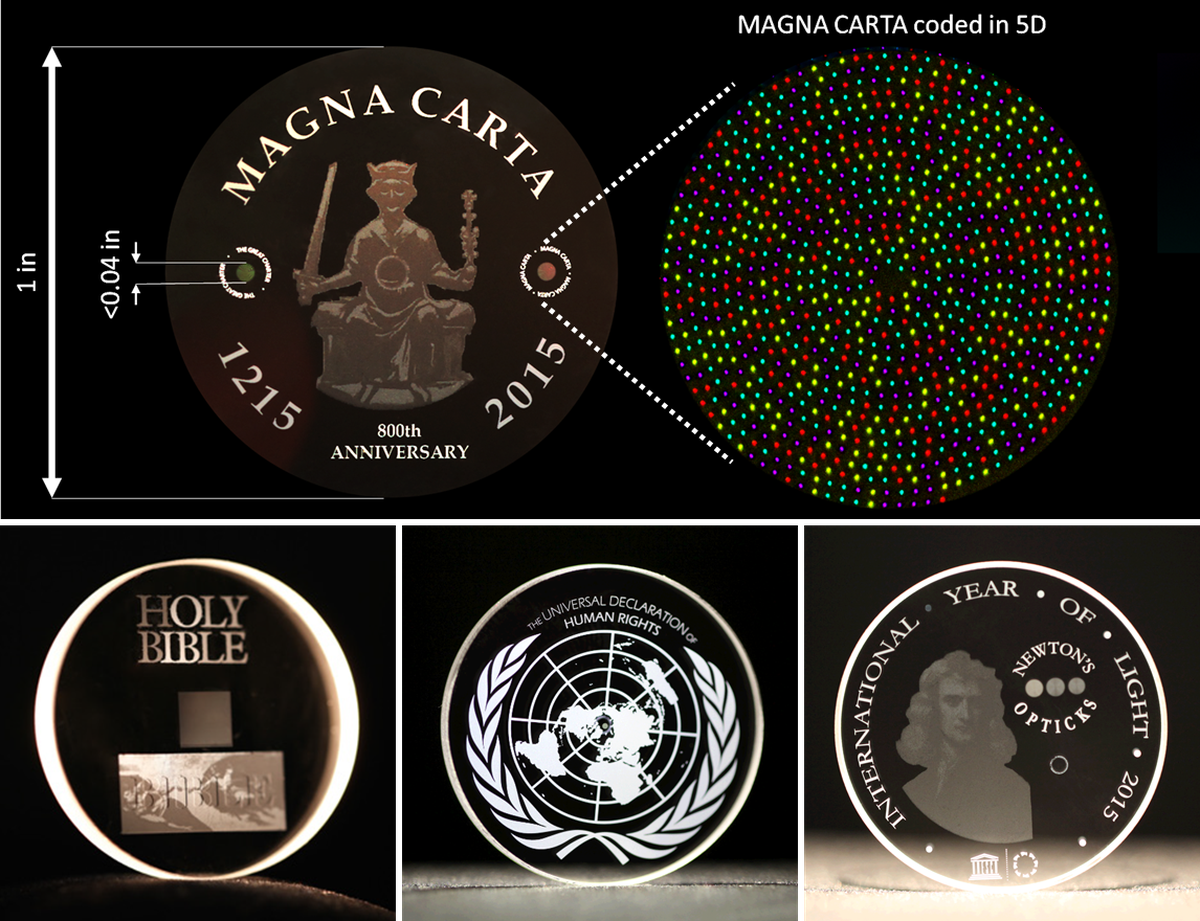 5D data storage의 원리